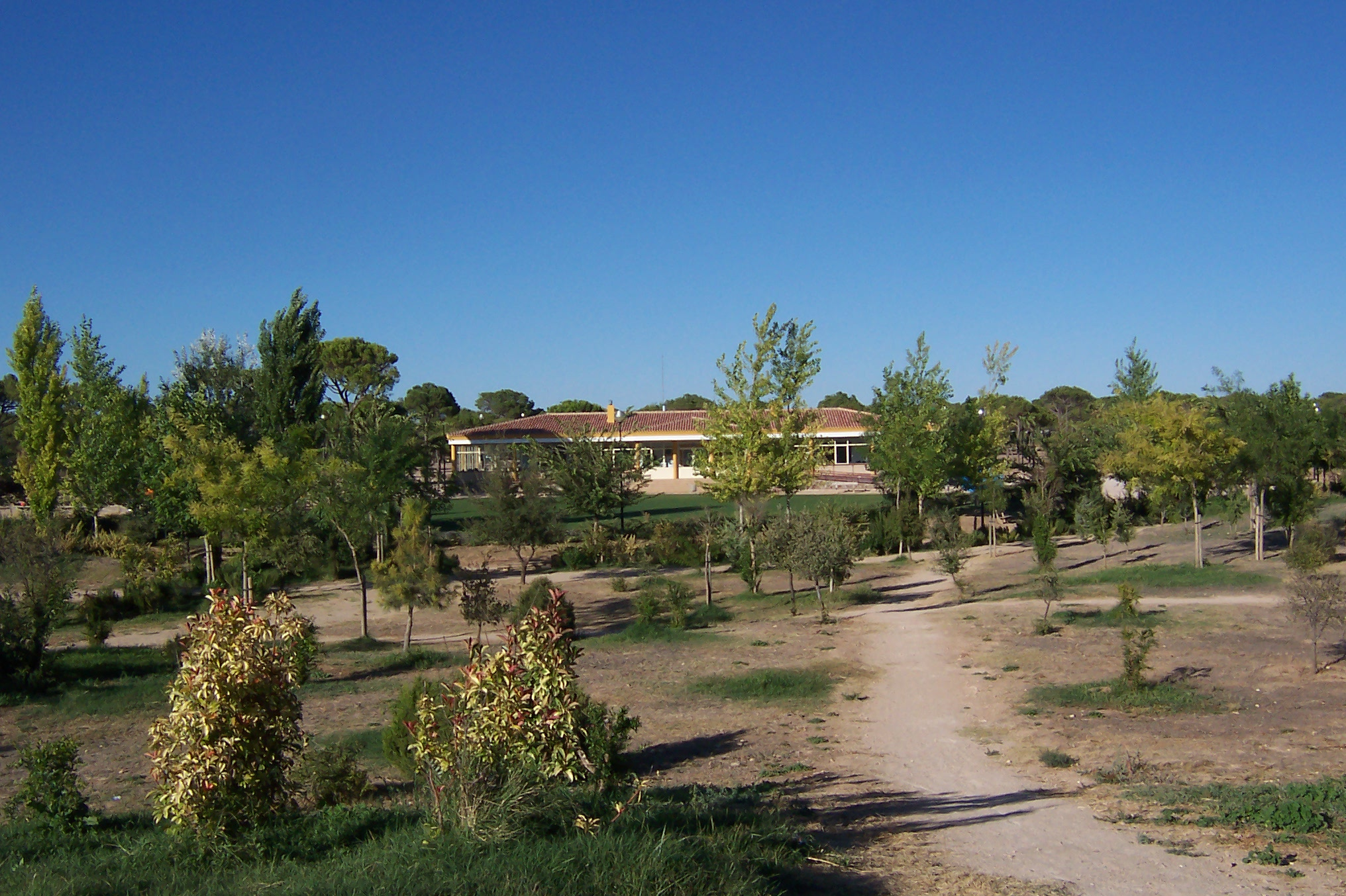 Vista del parque periurbano La Pulgosa en Albacete.